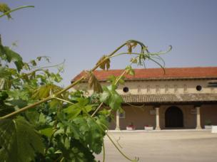 Puerta de la Sala de Crianza de Bodegas Cristo de la Vega con una pequeña visión de la parra que hay plantada en el patio